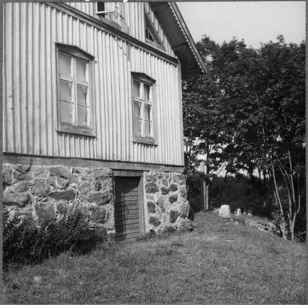 Kapellplatsen med senare byggnad samt kors rest 1946. Kategori: (01) ExteriörerKapellplatsen med senare byggnad samt kors rest 1946.